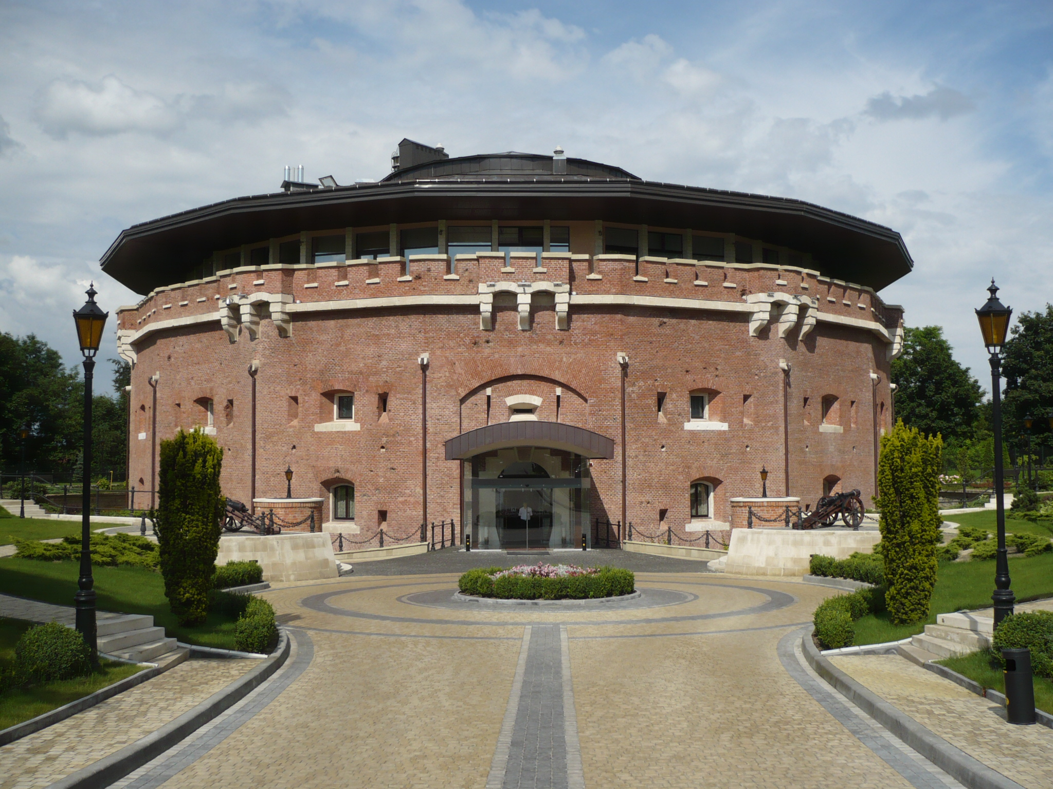 Lwów - cytadela